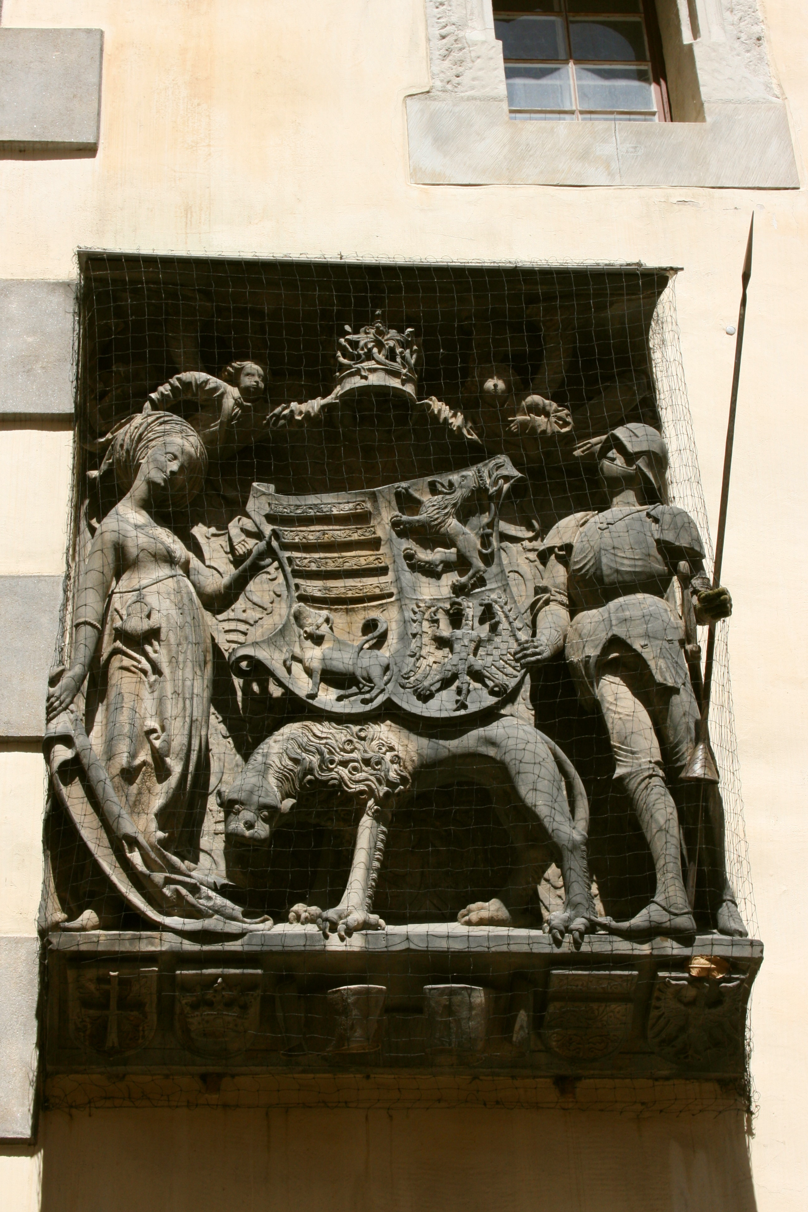 Corvinuswappen am Alten Rathaus in Görlitz